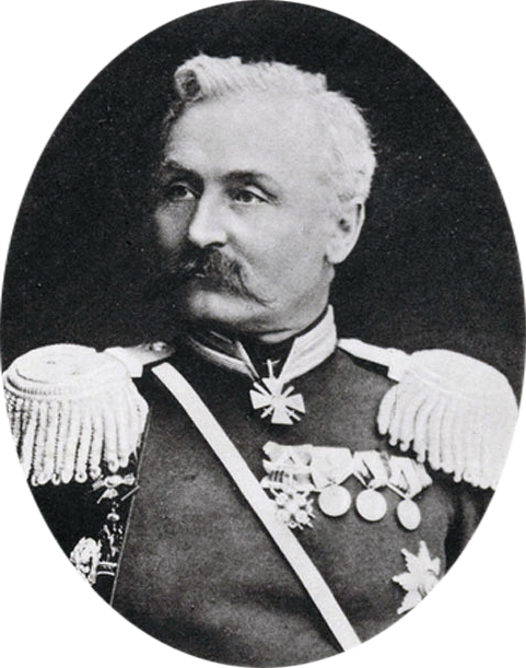 Генерал-майор Александр Карлович Водар